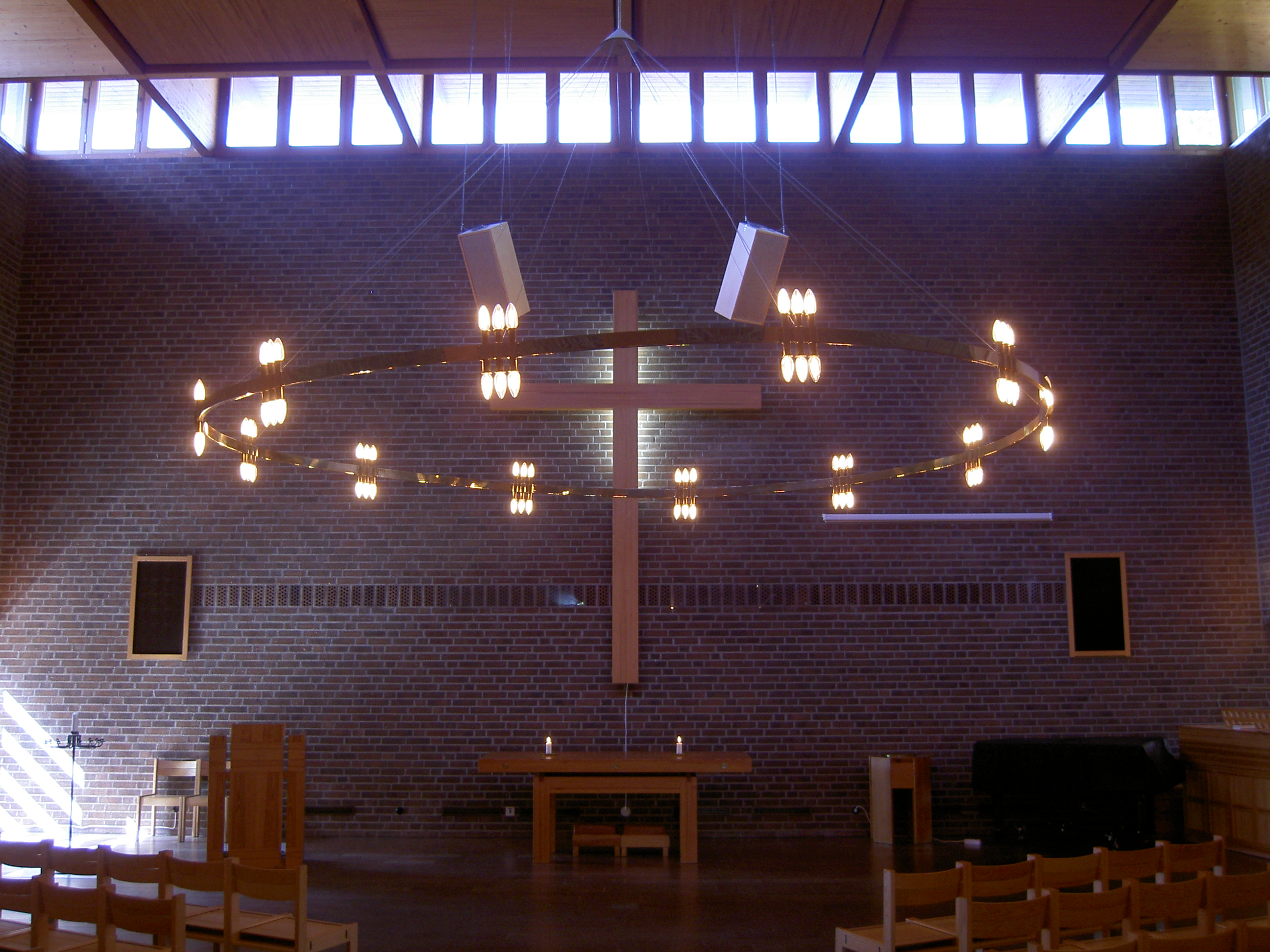 Kyrksal i Akalla kyrka